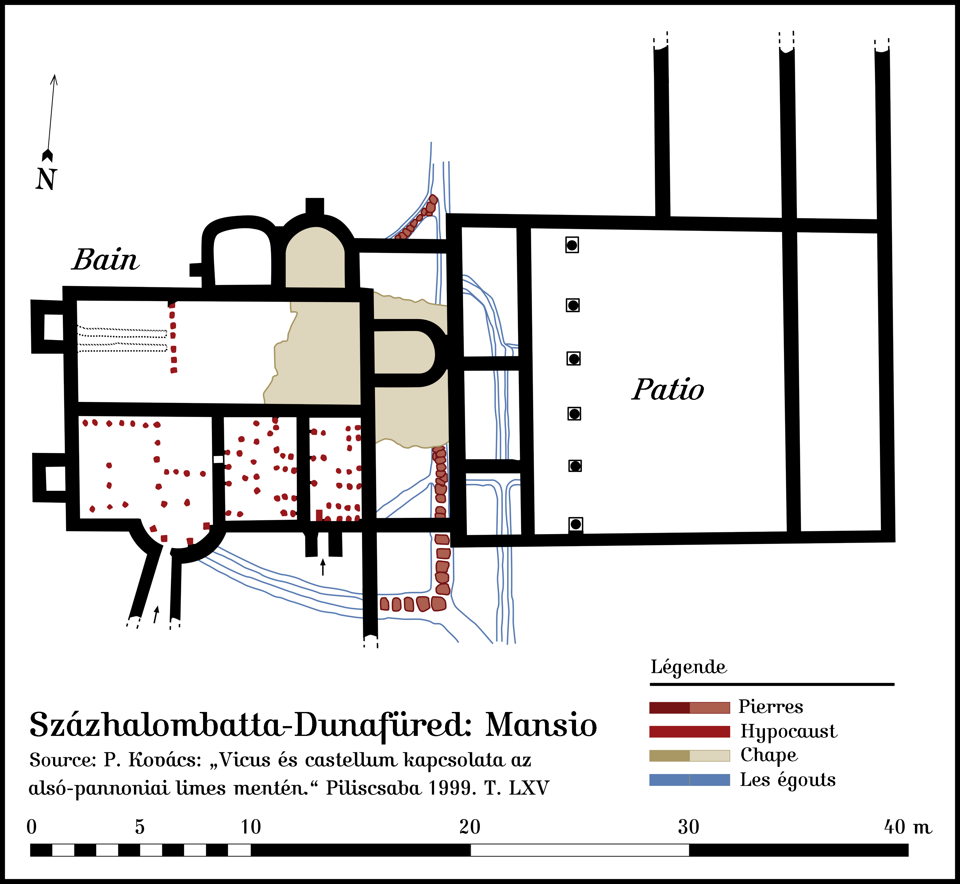 Vicus du fort Százhalombatta-Dunafüred (Matrica, Hongrie): Mansio. La source de ce plan est de préciser dans le dessin.